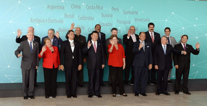 Presidentes de, China, Líderes de América latina y el Caribe en la Cumbre Brasil.